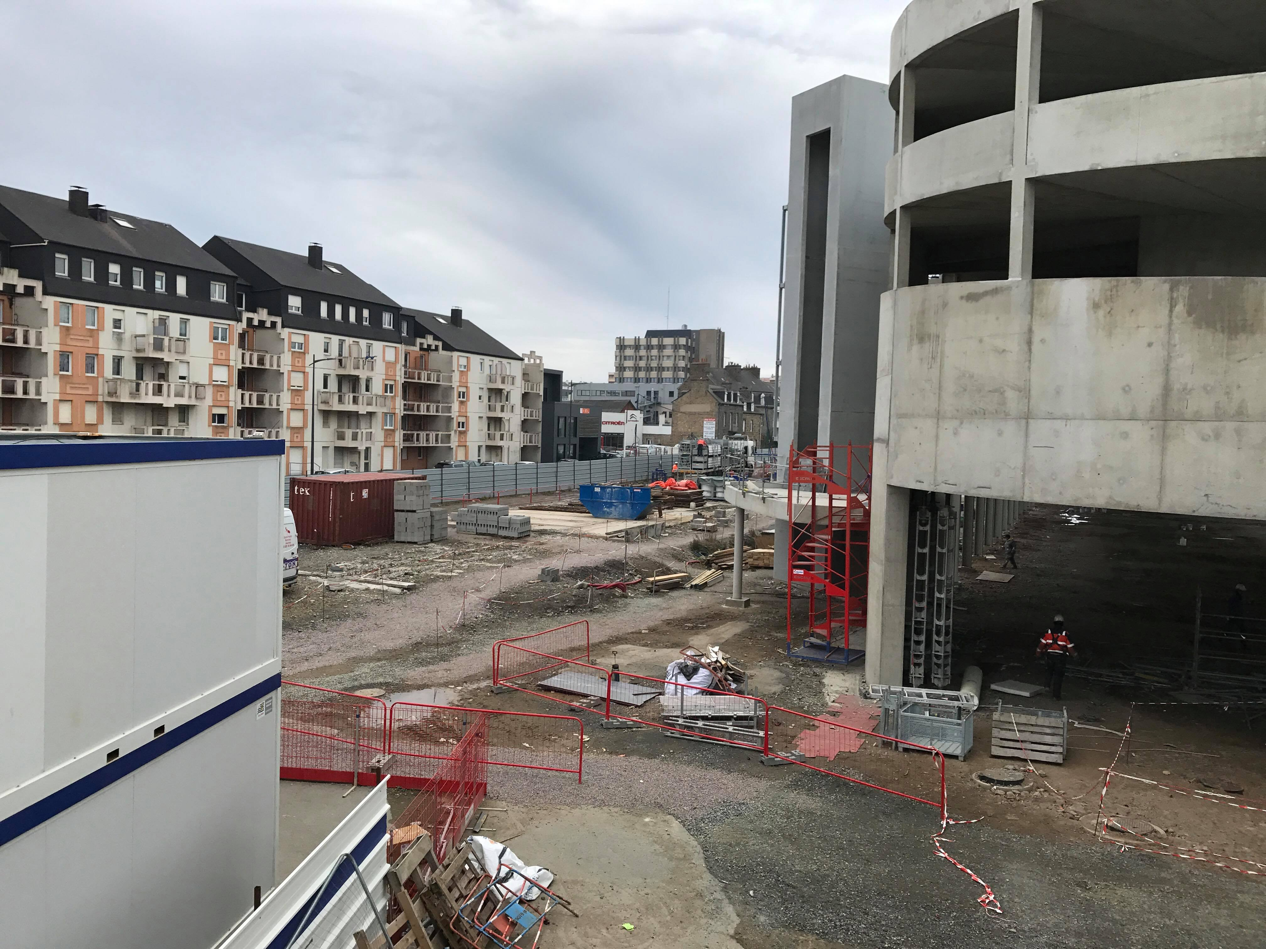 Pôle d'échanges multimodal - St-Brieuc